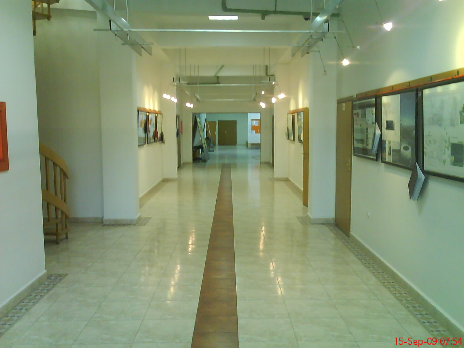 hodnik na spratu za arhitekturu